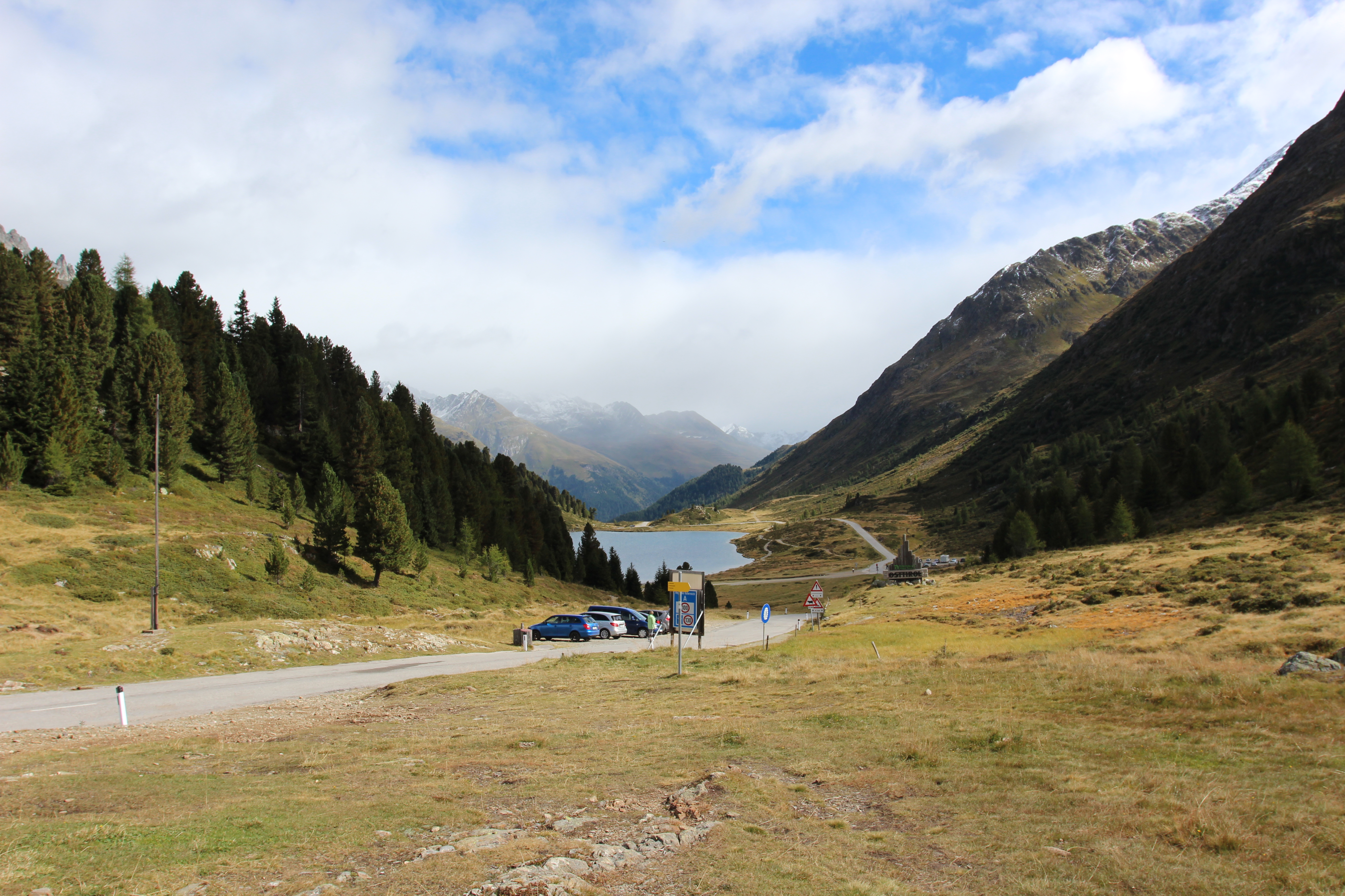 Obersee in Tirol, Österreich.